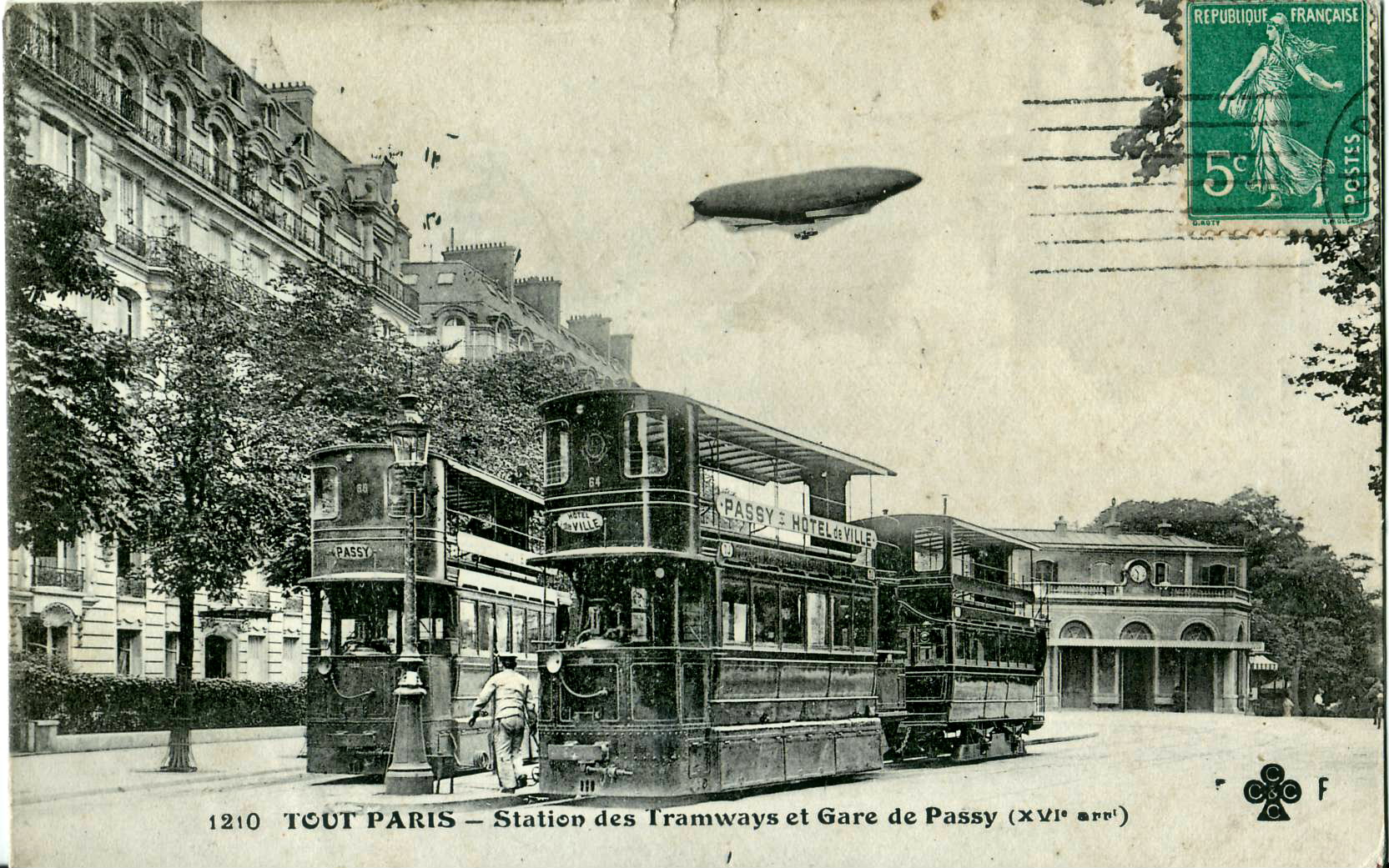 Carte postale éditée par CCCC - FF (Fleury), N° 1210TOUT PARIS : Station des Tramways et Gare de Passy